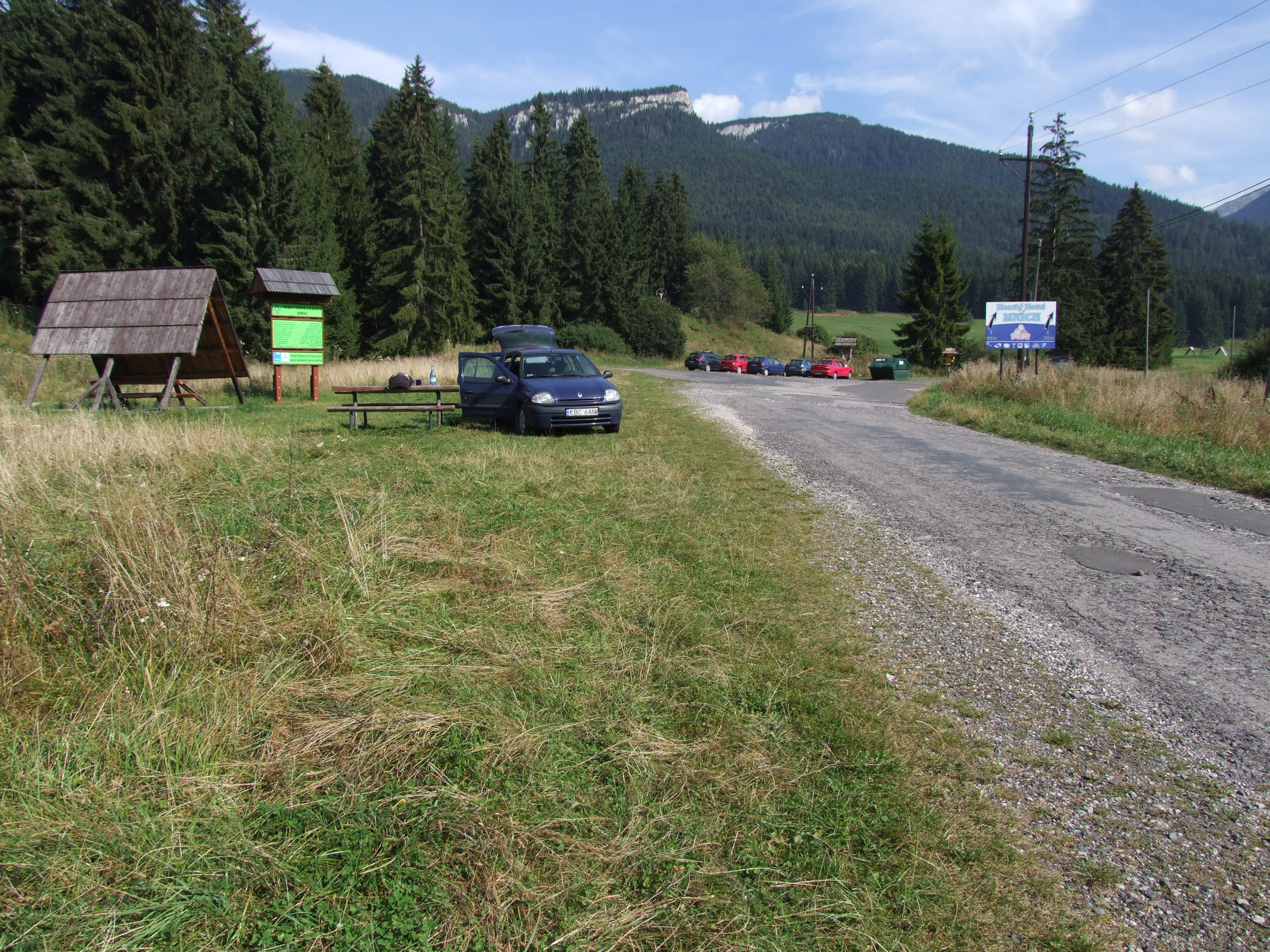 Wylot Doliny Jałowieckiej. Parking na Bobrowieckim Wapienniku